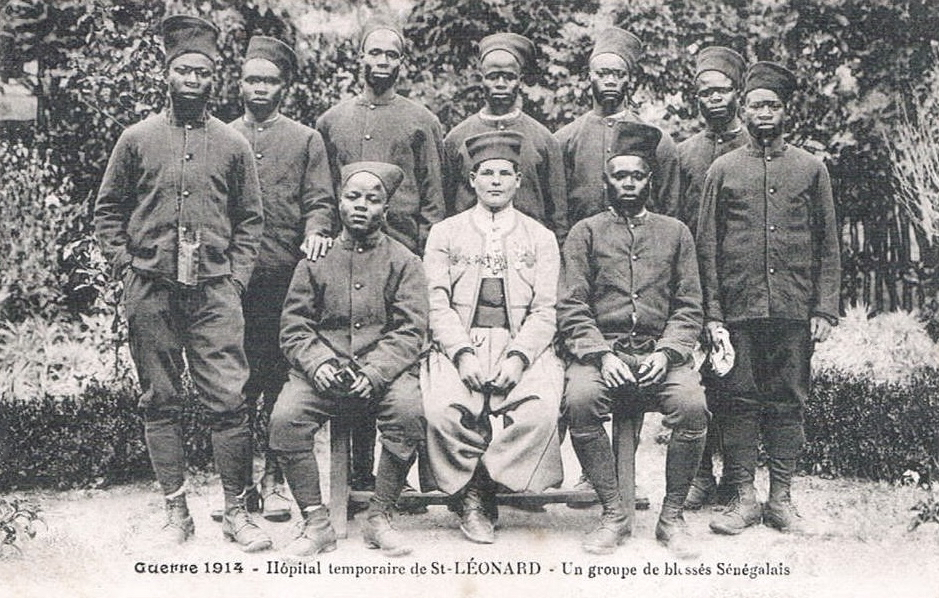 Tirailleurs sénégalais blessés, hôpital temporaire de Saint-Léonard, 1914-1918